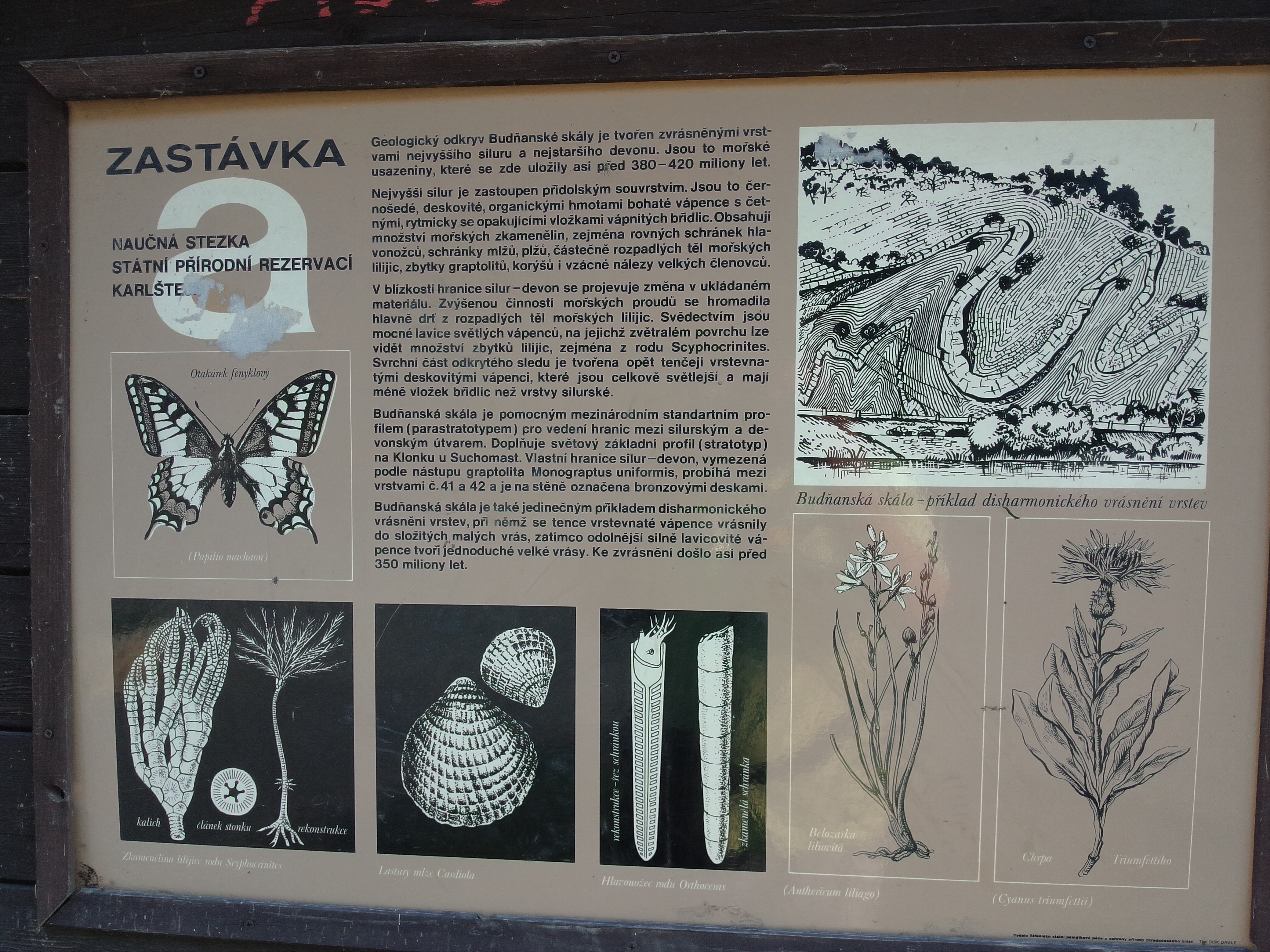 Budnanska skala